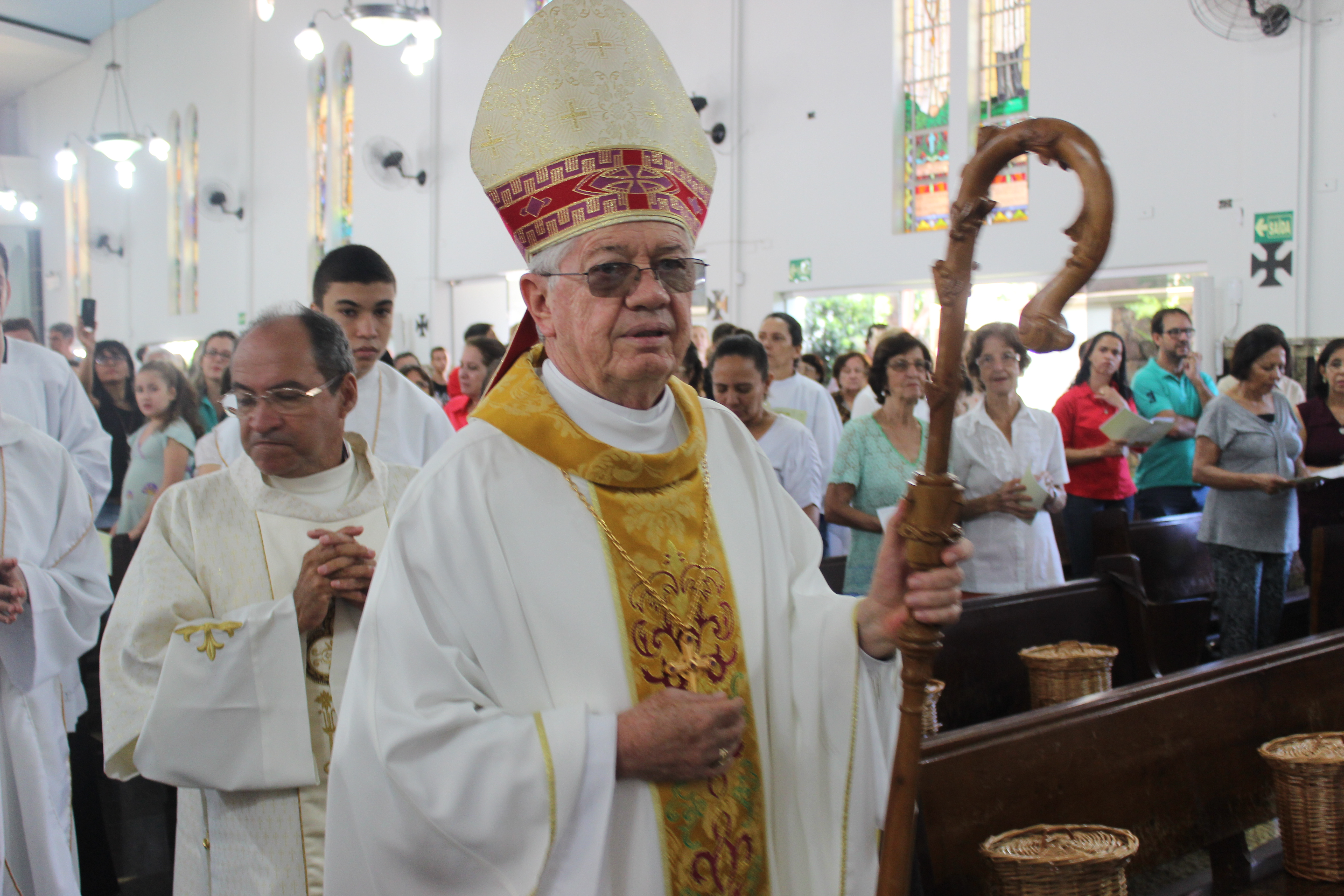 Bispo brasileiro de Itumbiara-GO, Dom Fernando Brochini